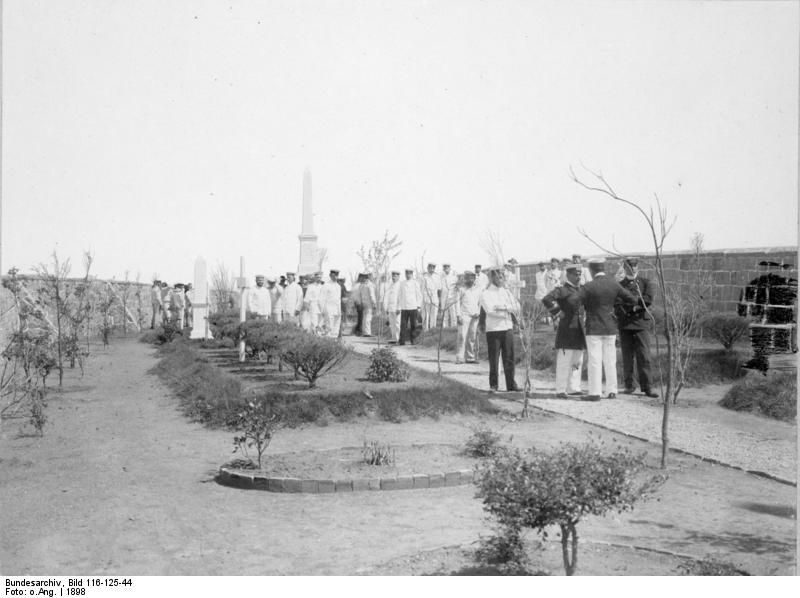 China 1898 Besuch des Iltis-Kirchhofes durch Se. Königl. Hoheit den Prinzen Heinrich